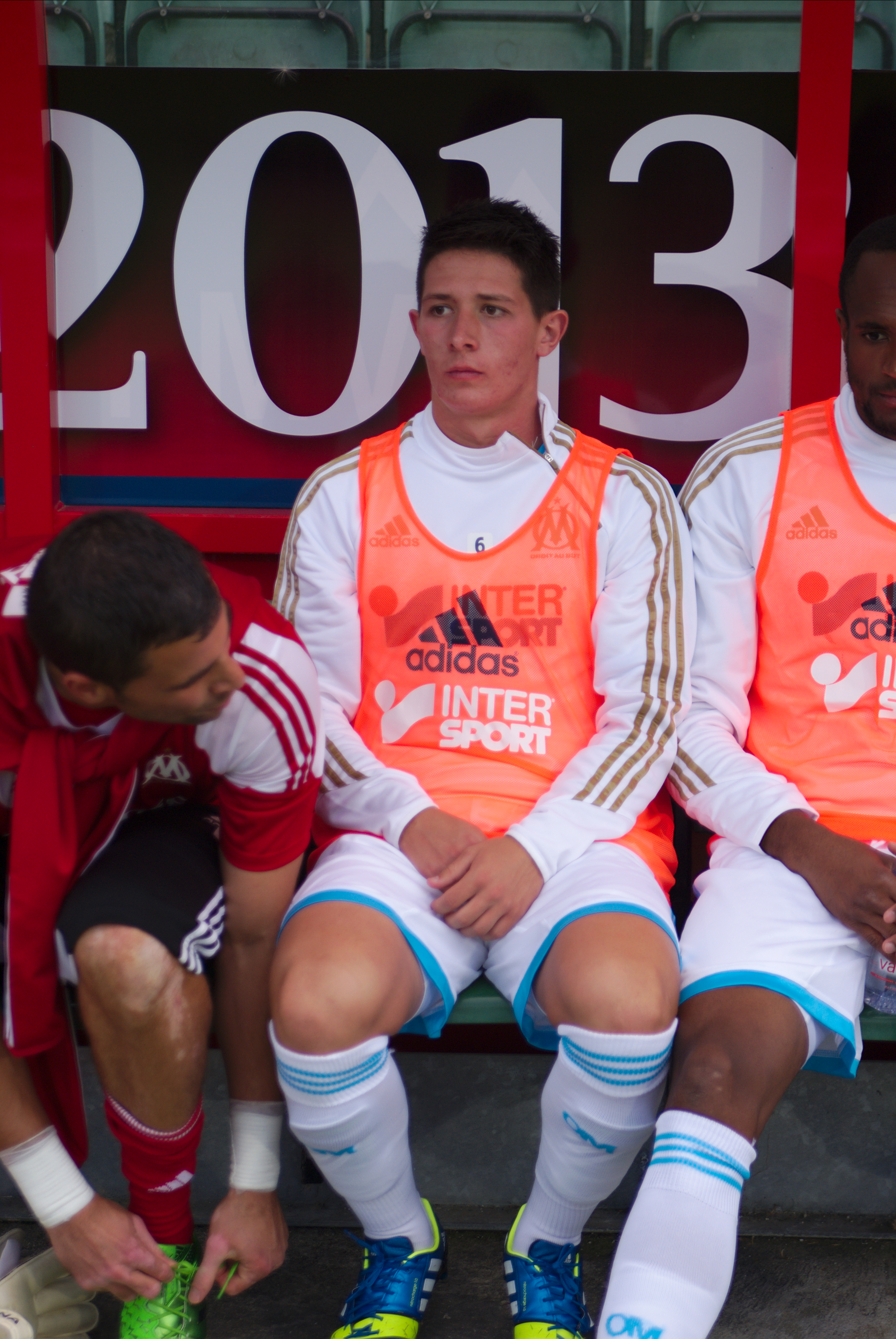 Valais Cup 2013 - OM-FC Porto - 20130713 - Laurent Abergel